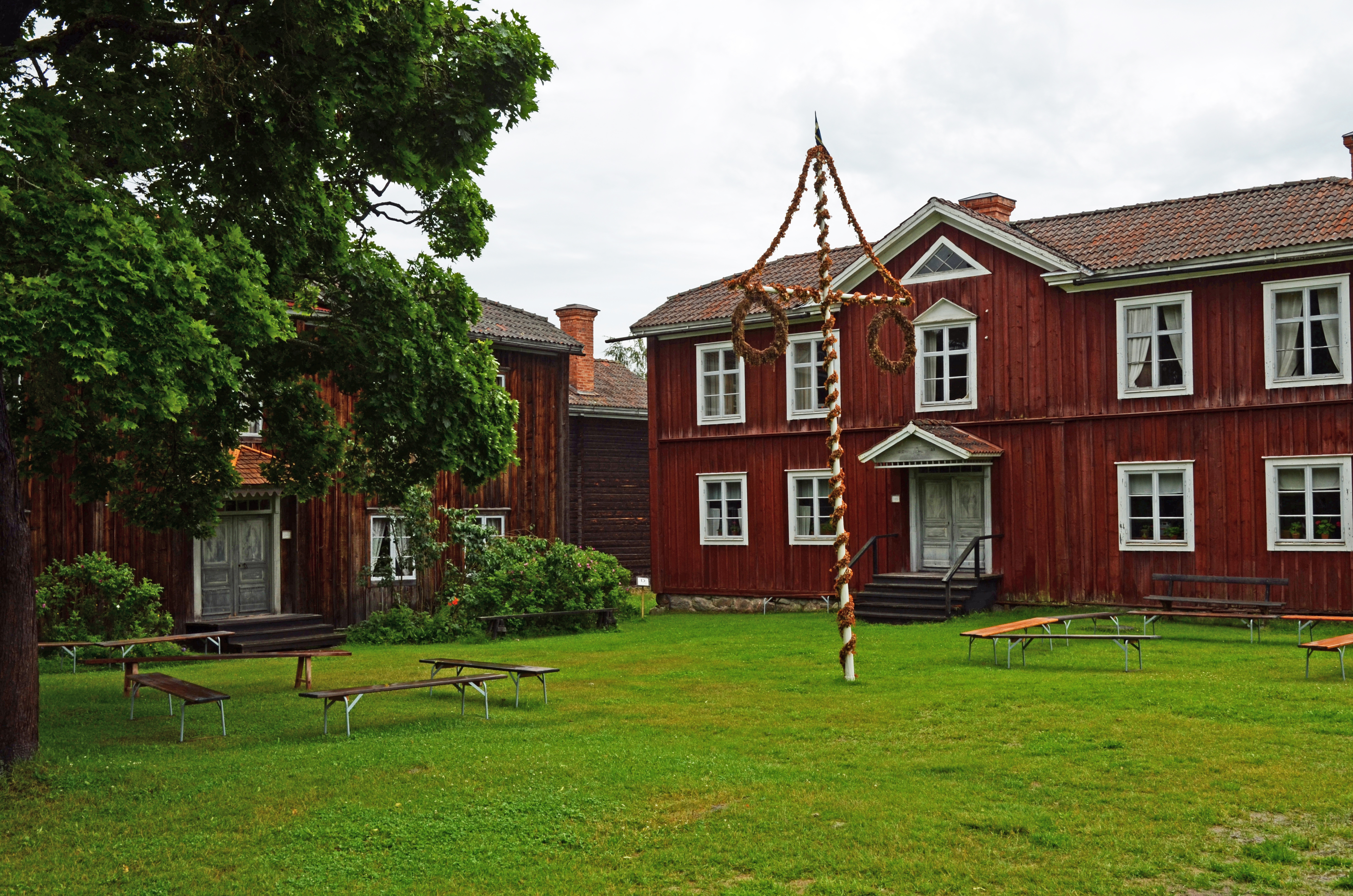 Mangårdsbyggnad i Västerby hembygdsby i Rengsjö församling i Bollnäs kommun, Hälsingland. Hembygdsbyn är en gammal klungby med ett trettiotal byggnader. Foto: Urban Sikeborg 2012-07-09.